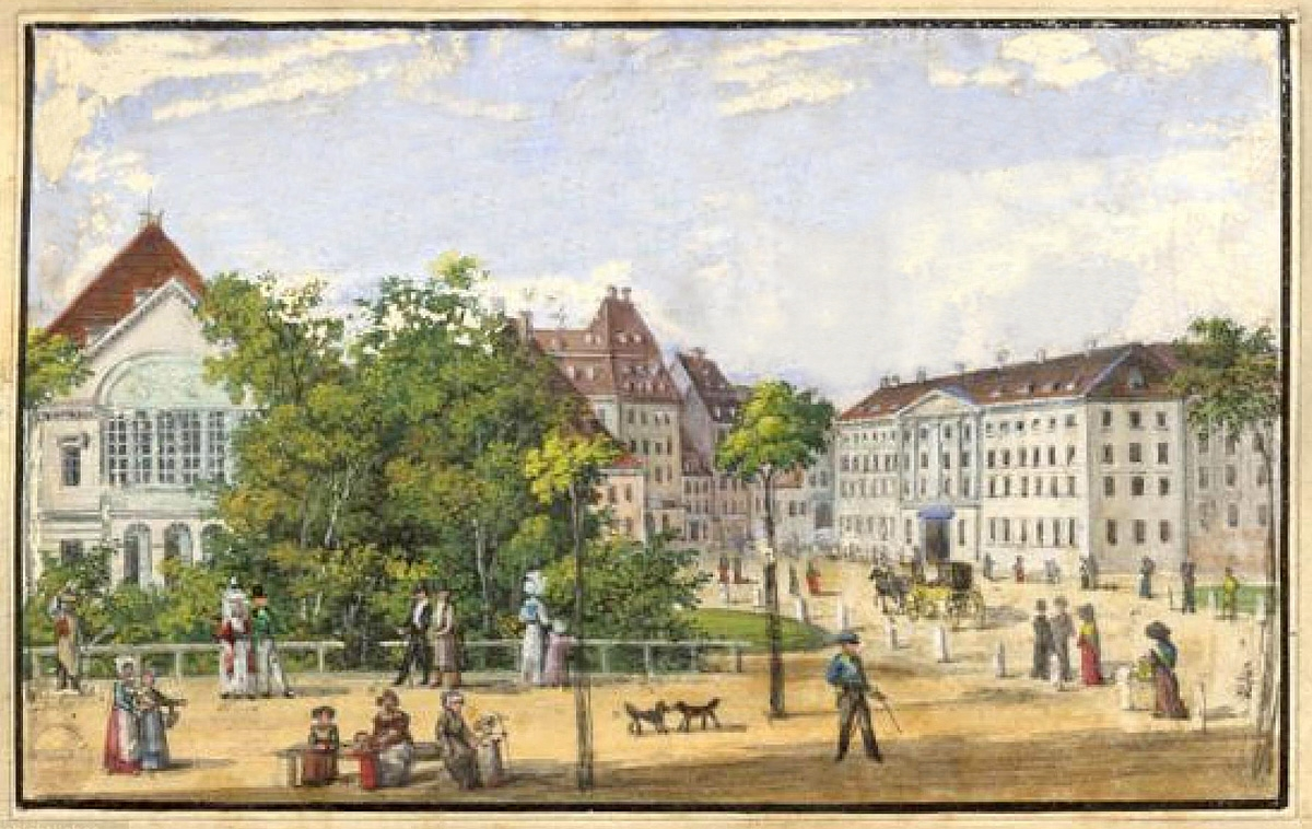 Theaterplatz Leipzig um 1840 mit Altem Theater und Großem Blumenberg